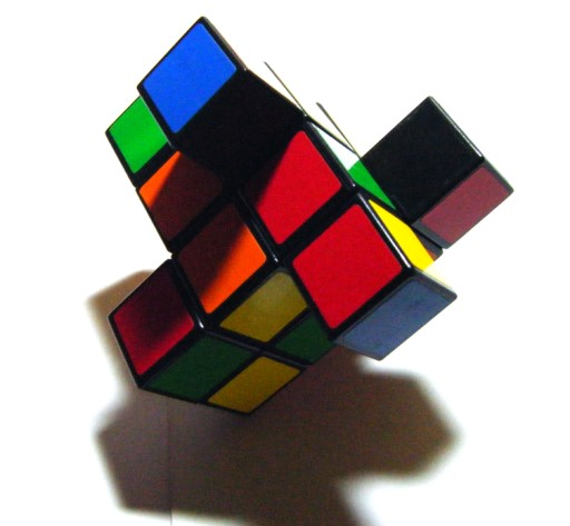 轉亂後的2x2x4魔術方塊